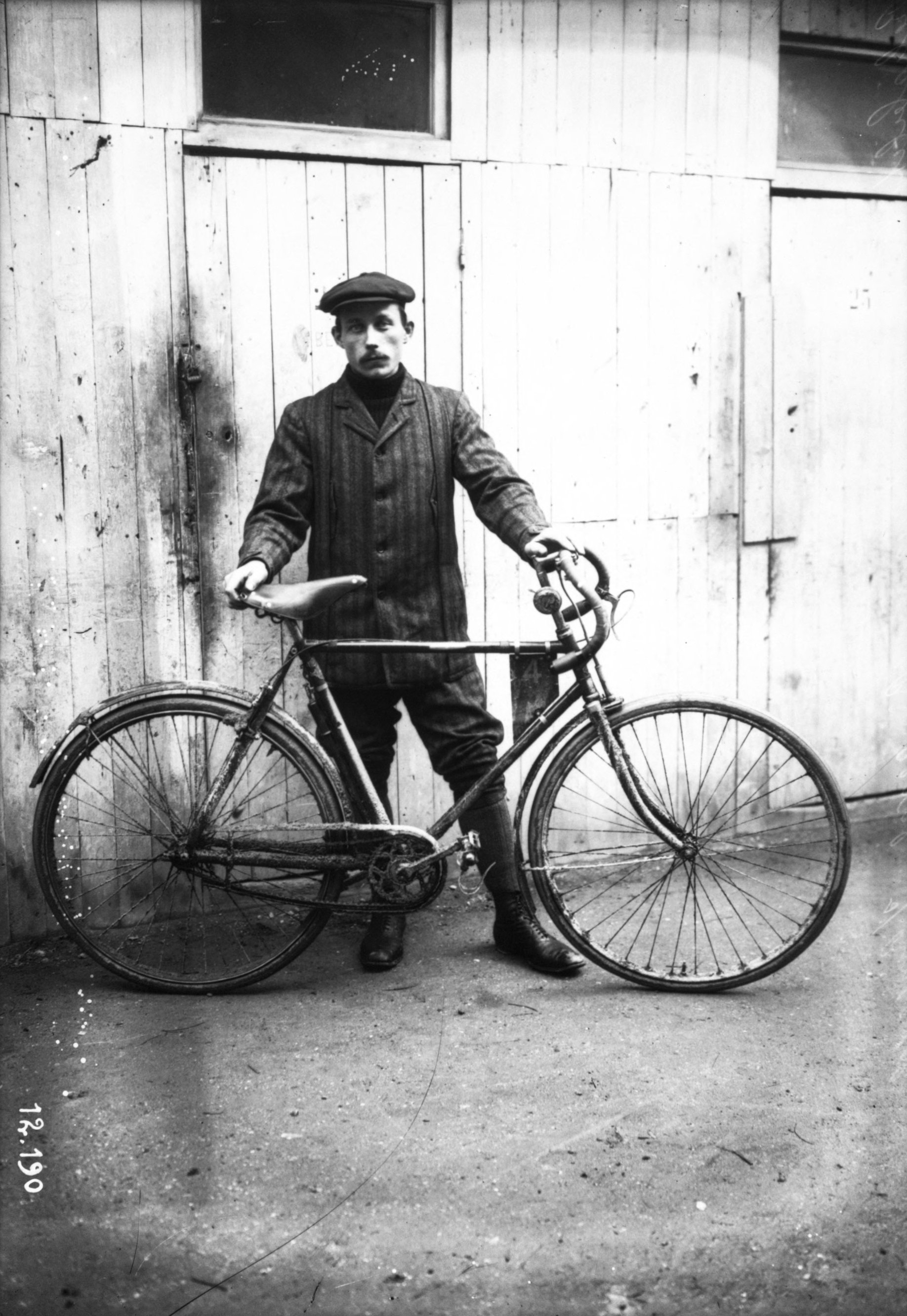 Reliability Trials. Décembre 1910. Ringeval sur Ringeval.